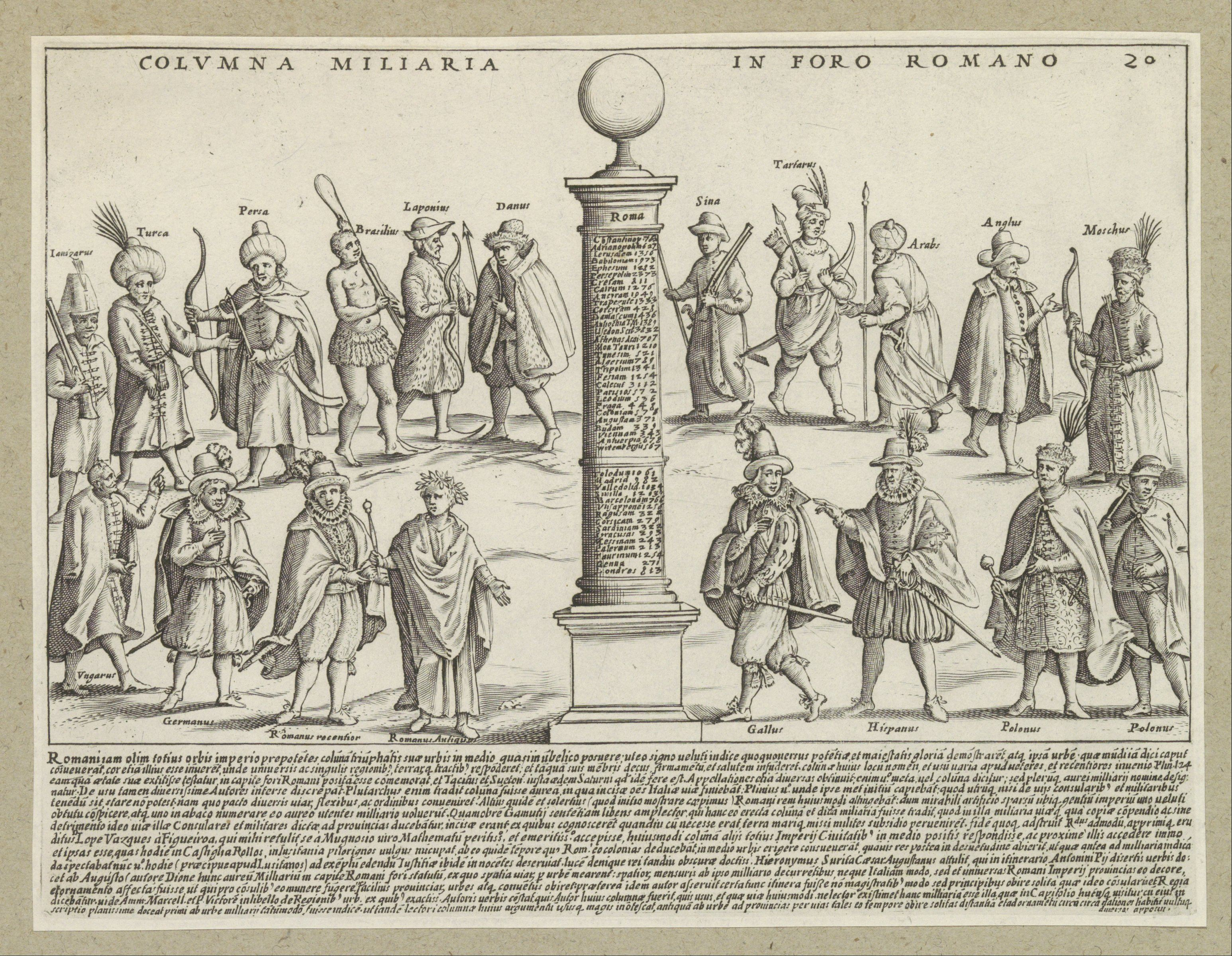 IdentificatieTitel(s): Milliarium Aureum op het Forum Romanum te RomeColumna Miliaria in Foro Romano (titel op object)Antieke monumenten (serietitel)Antiquae Urbis Splendor (serietitel)Objecttype: prent albumblad Objectnummer: RP-P-2016-345-28-1Catalogusreferentie: LeBlanc 2Aantal staten bekend-2(2)Omschrijving: Gezicht op de Milliarium Aureum, de Gouden Mijlpaal, op het Forum Romanum te Rome. Deze mijlpaal gaf het punt aan Waar: alle Romeinse wegen zouden beginnen. Rondom de mijlpaal staan negentien mannen van de verschillende continenten, zoals een Duitser, een Braziliaan en een Arabier. Tekst in het Latijn in ondermarge. Genummerd rechtsboven: 20. De prent maakt deel uit van een album.VervaardigingVervaardiger: prentmaker: Giacomo Laurodrukker: Giacomo MascardiPlaats vervaardiging: prentmaker: Italiëdrukker: RomeDatering: in of na 1637Fysieke kenmerken: etsMateriaal: papier Techniek: etsenAfmetingen: plaatrand: h 180 mm × b 235 mmToelichtingDeze prent maakt deel uit van een set van 158 prenten (+ titelprenten), die verscheen in vier delen. In 1612 verschenen delen één en twee. In 1615 verscheen het derde deel en in 1628 verscheen deel vier. In 1637 publiceerde Vitale Mascardi de eerste heruitgave van de gehele set met nummering.OnderwerpWat: milestoneWaarMiliarium AureumForum RomanumVerwerving en rechtenCredit line: Bruikleen van de Rijksacademie van Beeldende KunstenVerwerving: bruikleen 1979Copyright: Publiek domein